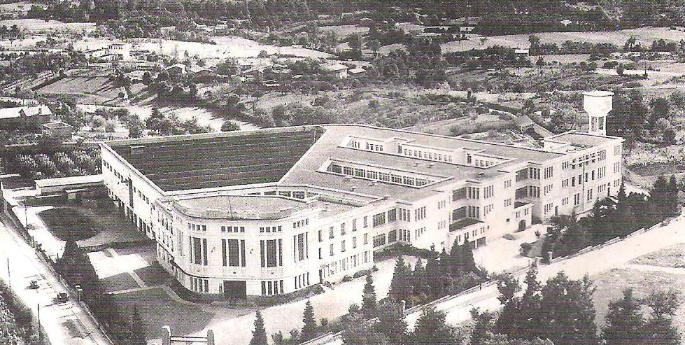 Lycée Jean Zay 1933 Thiers vue aérienne